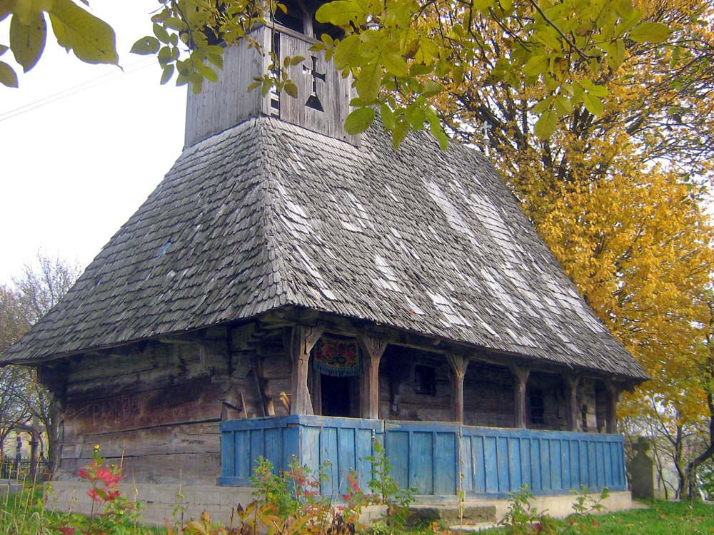 Biserica de lemn din Jac, Sălaj. Faţadele dinspre sud şi vest. Foto: Mihai Petriş, februarie 2007.